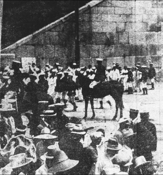 1926년 6.10 만세운동. 일본 경찰이 만세 시위를 벌이려는 군중을 진압하고 있다.